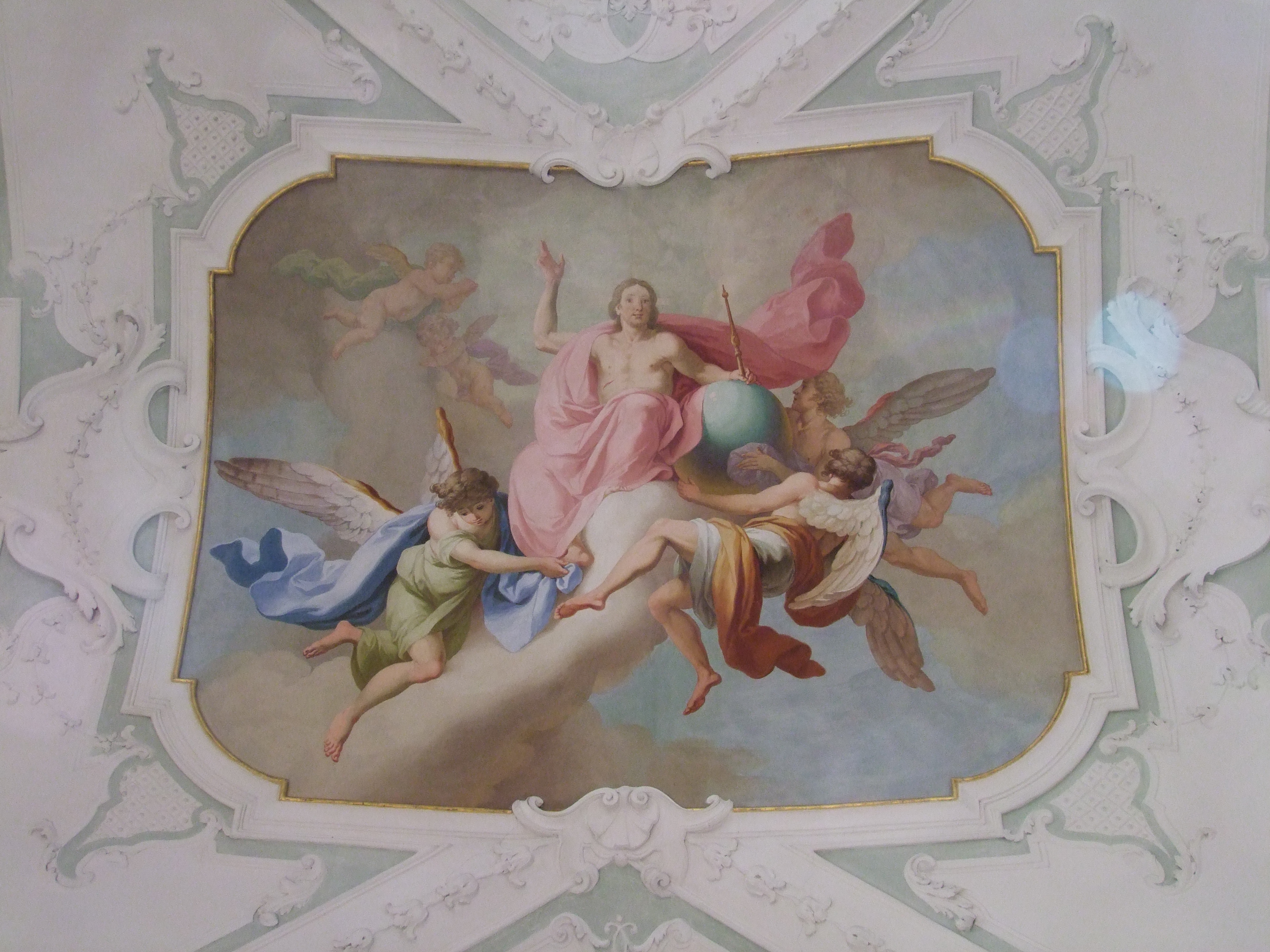 St. Georg, ehemalige Klosterkirche des oberschwäbischen Klosters Ochsenhausen